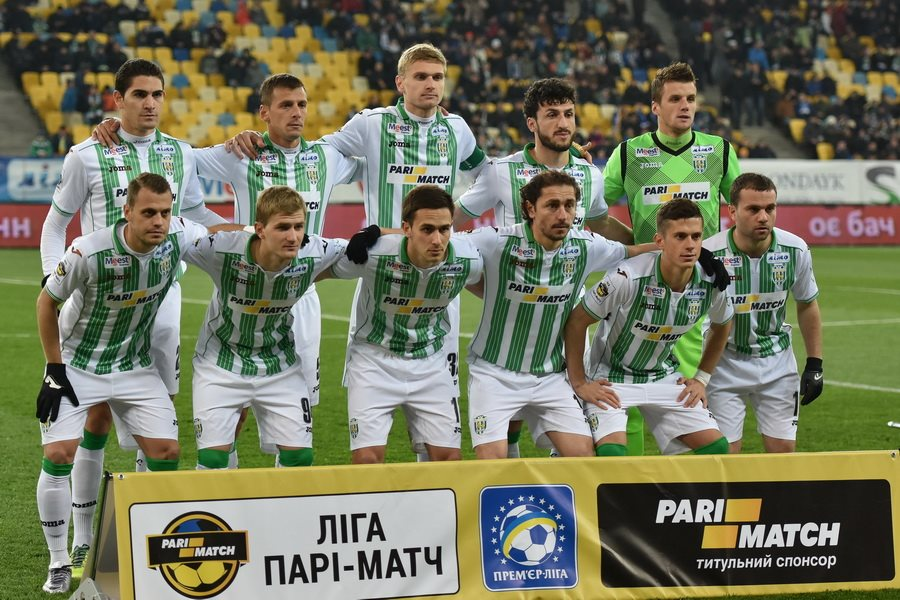 Склад Карпат (Львів) перед матчем проти Динамо (Київ)